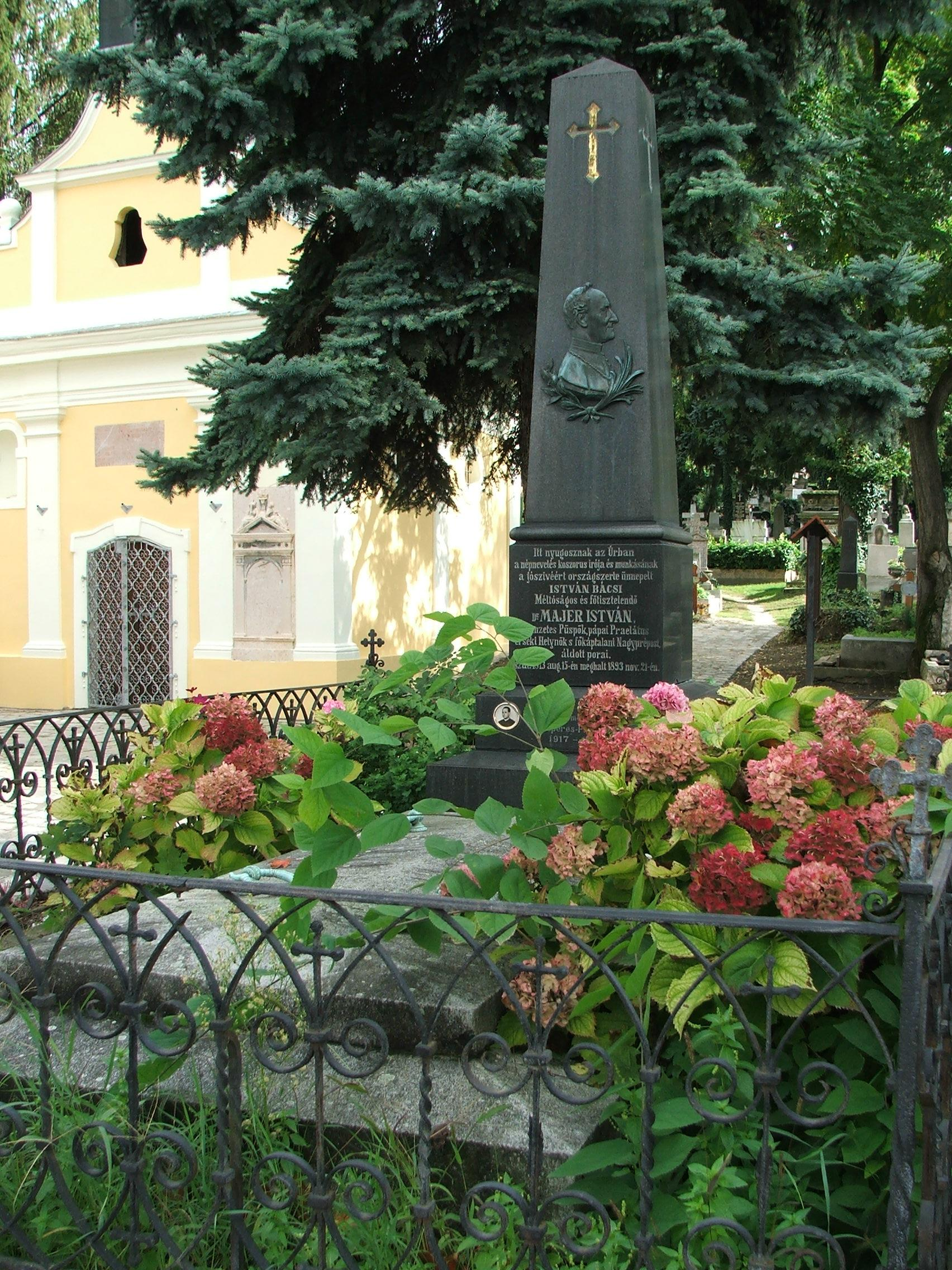 Majer István sírja, Esztergom, Belvárosi temető